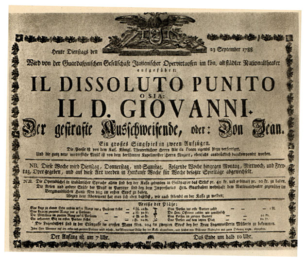 Oryginalny plakat operowy, reklamujący Don Giovanniego